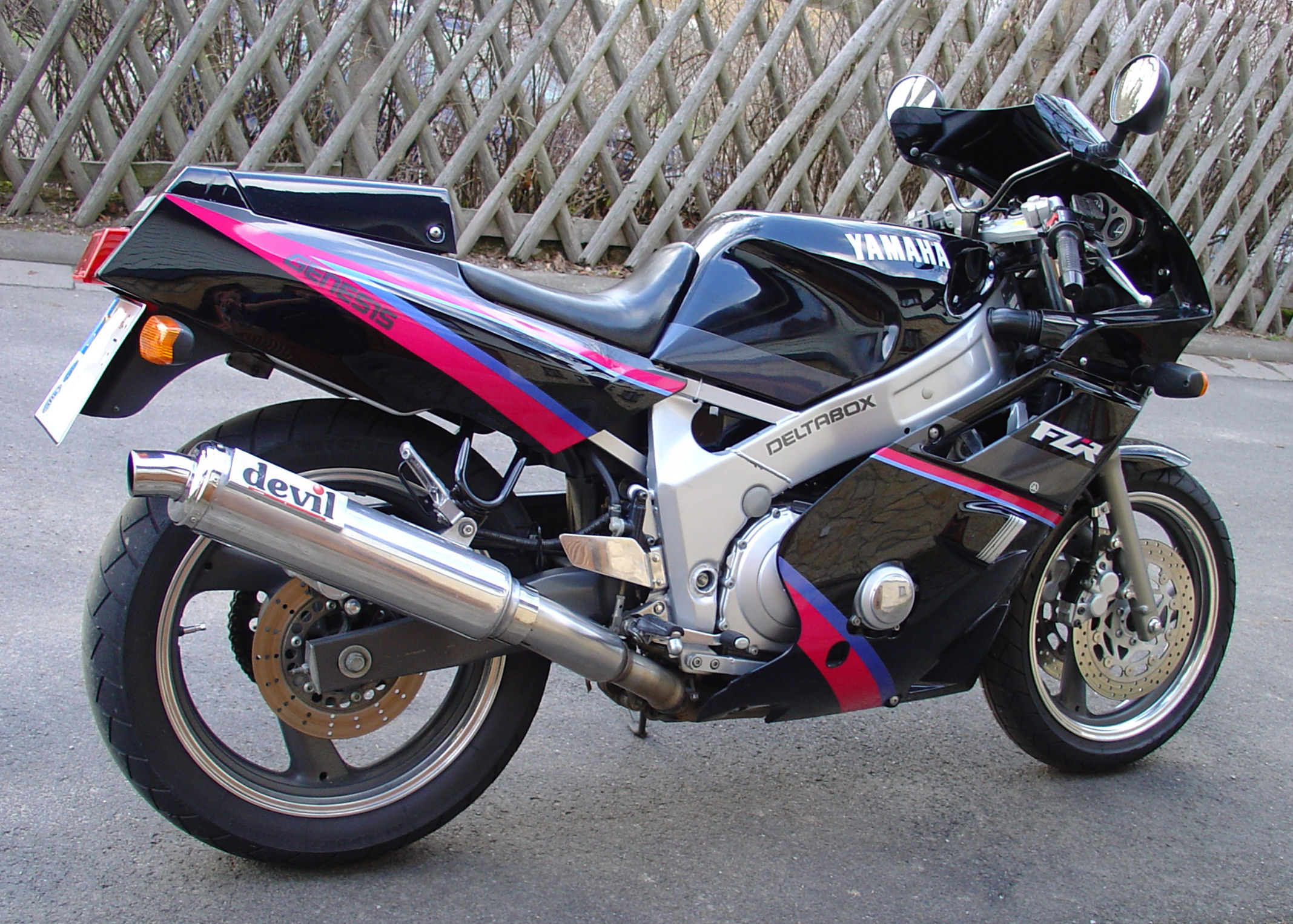 Yamaha FZR 600, Bj. 1991, Baureihe 3HE, mit DVIL Sportauspuff